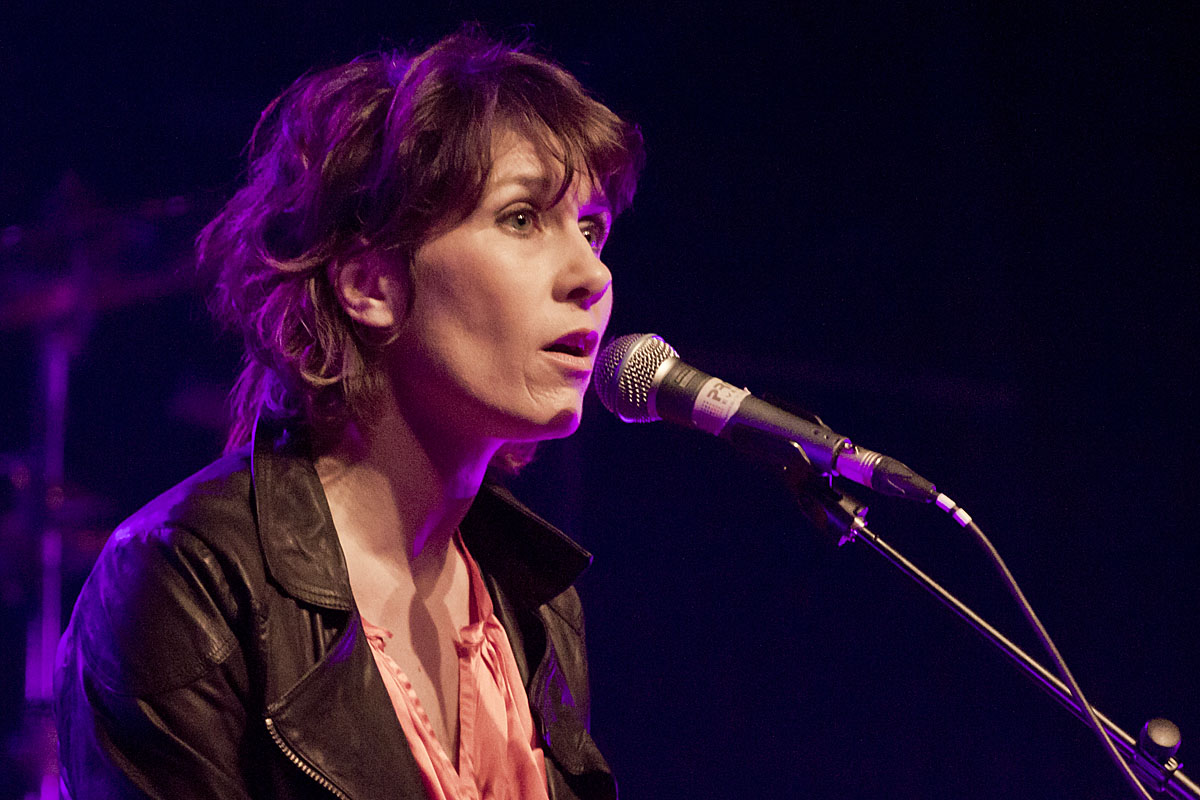 Skuespiller Mia Lyhne på Bremen Teater 12. januar 2013